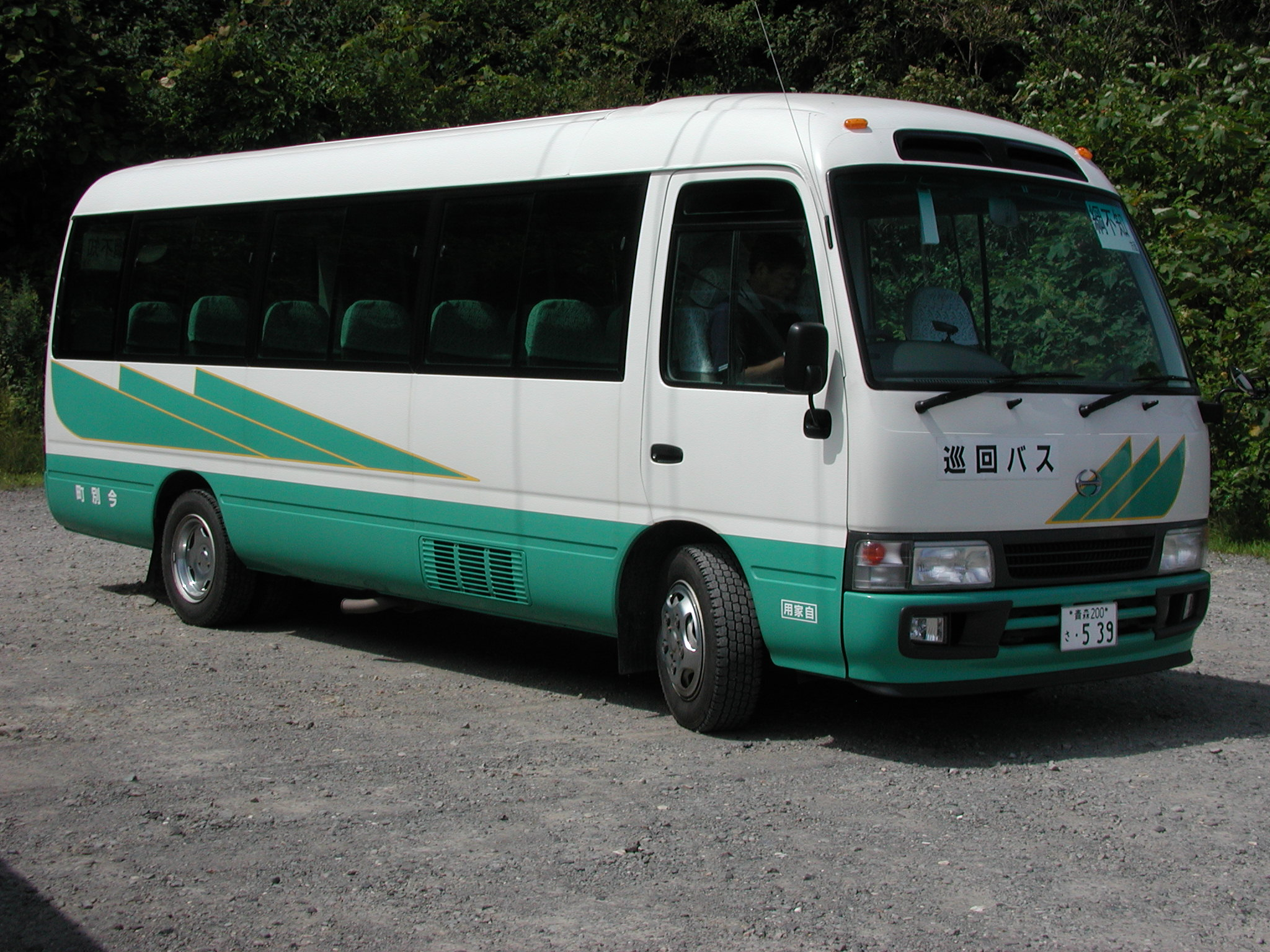 今別町巡回バス車両 - 日野・リエッセII平舘地区循環バス元宇田バス回転場（東津軽郡外ヶ浜町）にて